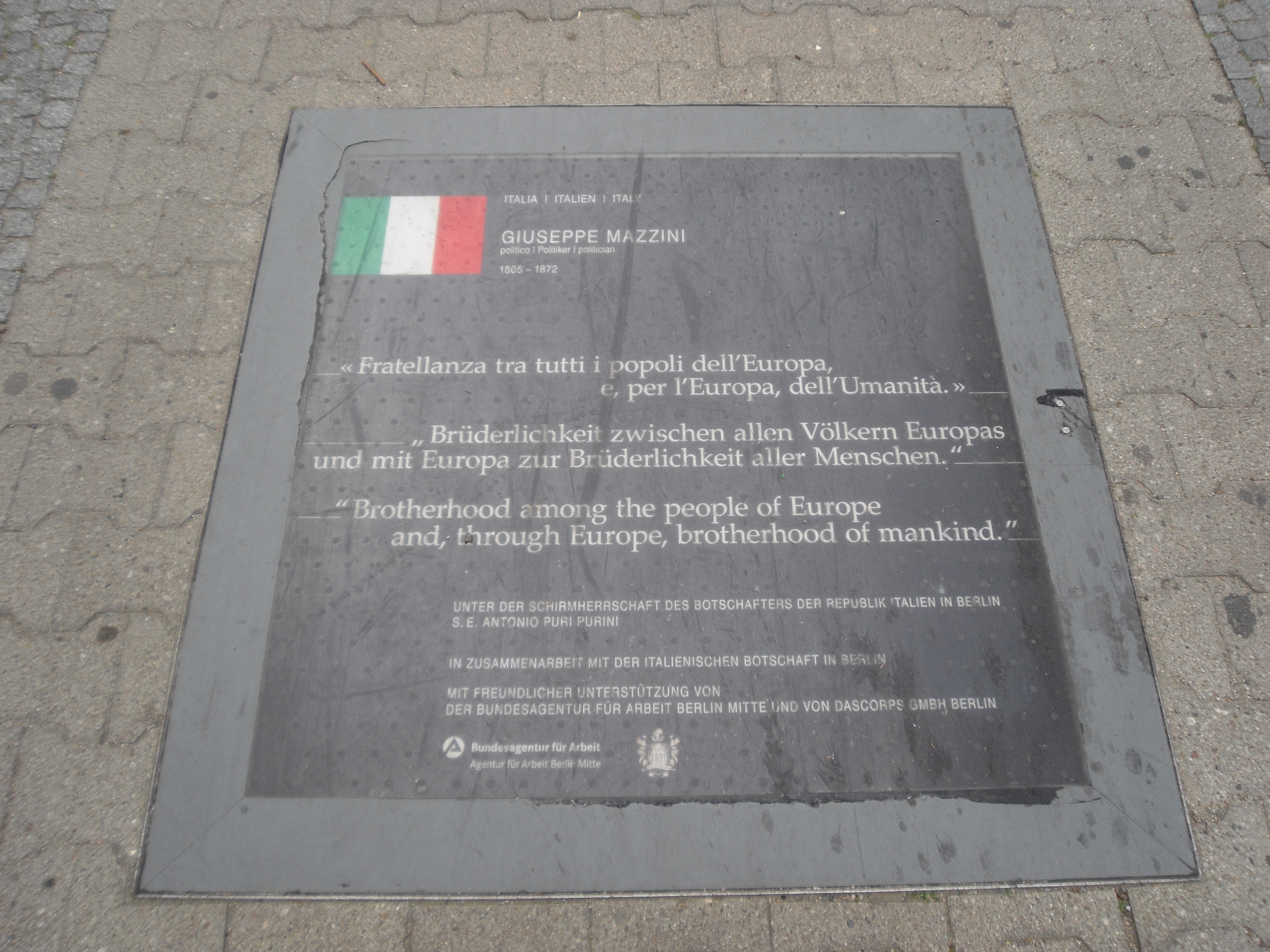 Bodentafel mit Zitat von Giuseppe Mazzini (1805-1872), Jurist, italienischer Nationalist, Demokrat und Freiheitskämpfer im Rahmen des Risorgimento; Berlin, "Pfad der Visionäre" (in der Fußgängerzone in der Friedrichstraße, nördlich des Mehringplatzes im Stadtbezirk Kreuzberg)